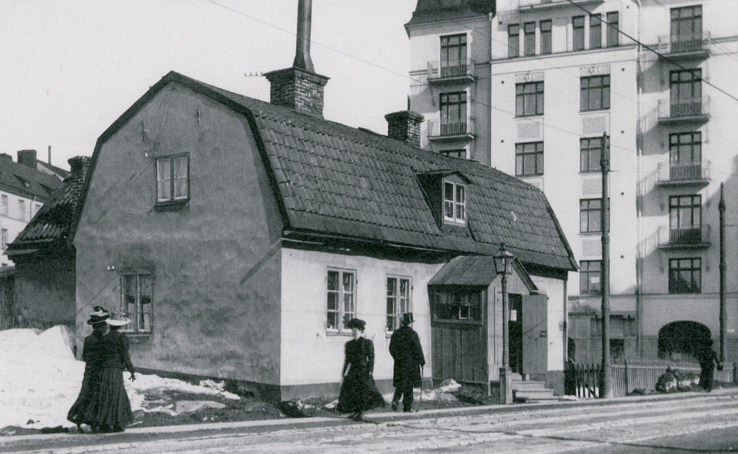 Gamla tullstugan vid Fridhemsplan på Kungsholmen, Stockholm